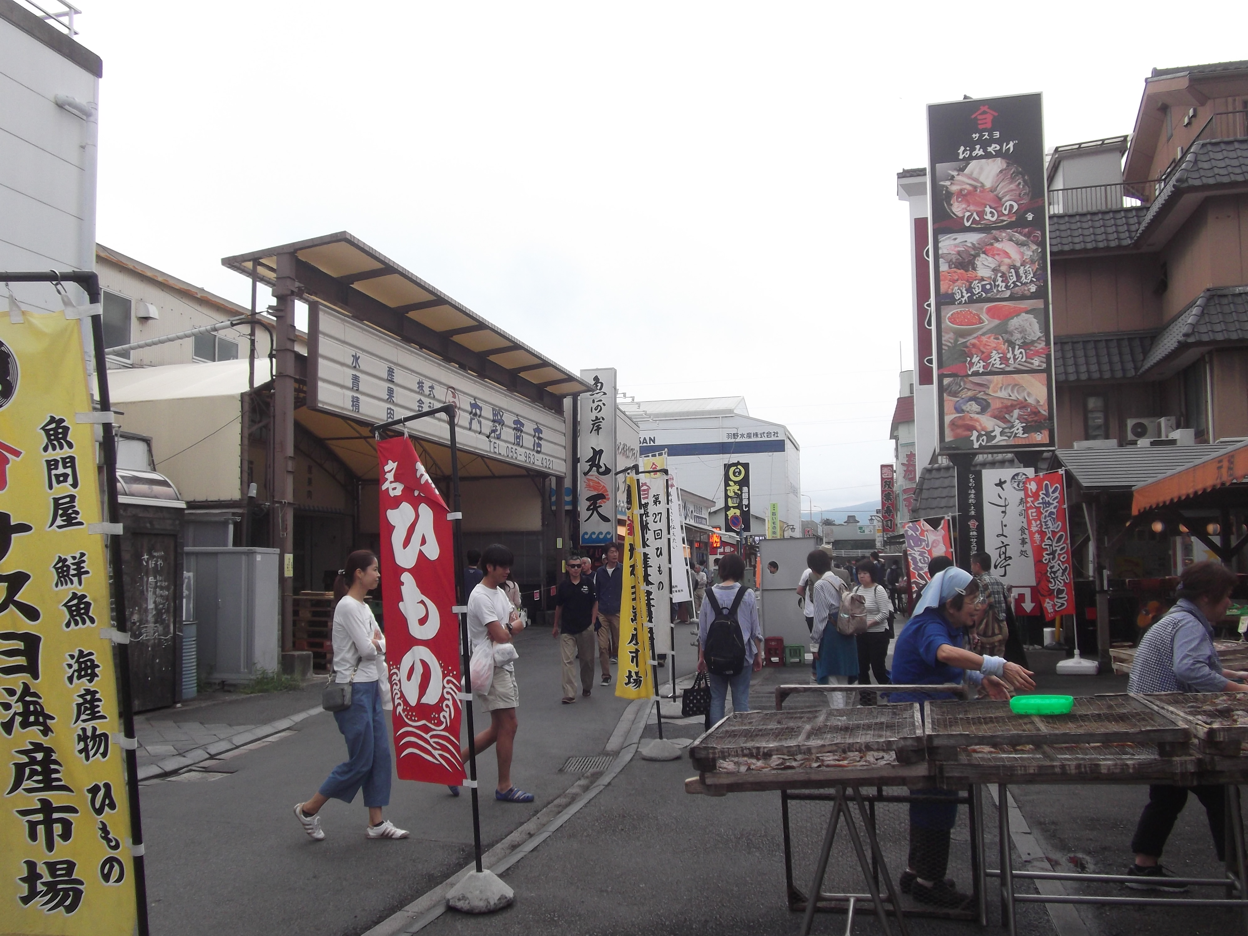 静岡県沼津市、沼津港にある海鮮品や海鮮食堂の立ち並ぶ通り